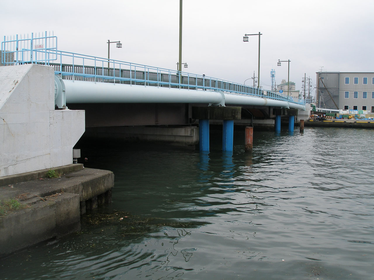 巴川河口に掛かる羽衣橋。国道150号の起点でもある。静岡市清水区清開1丁目。北々西の方向を見る。